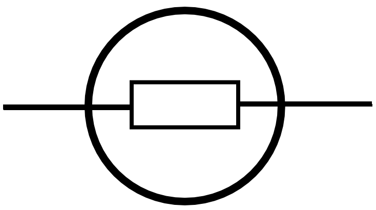 Schéma de l'ampoule à incandescence